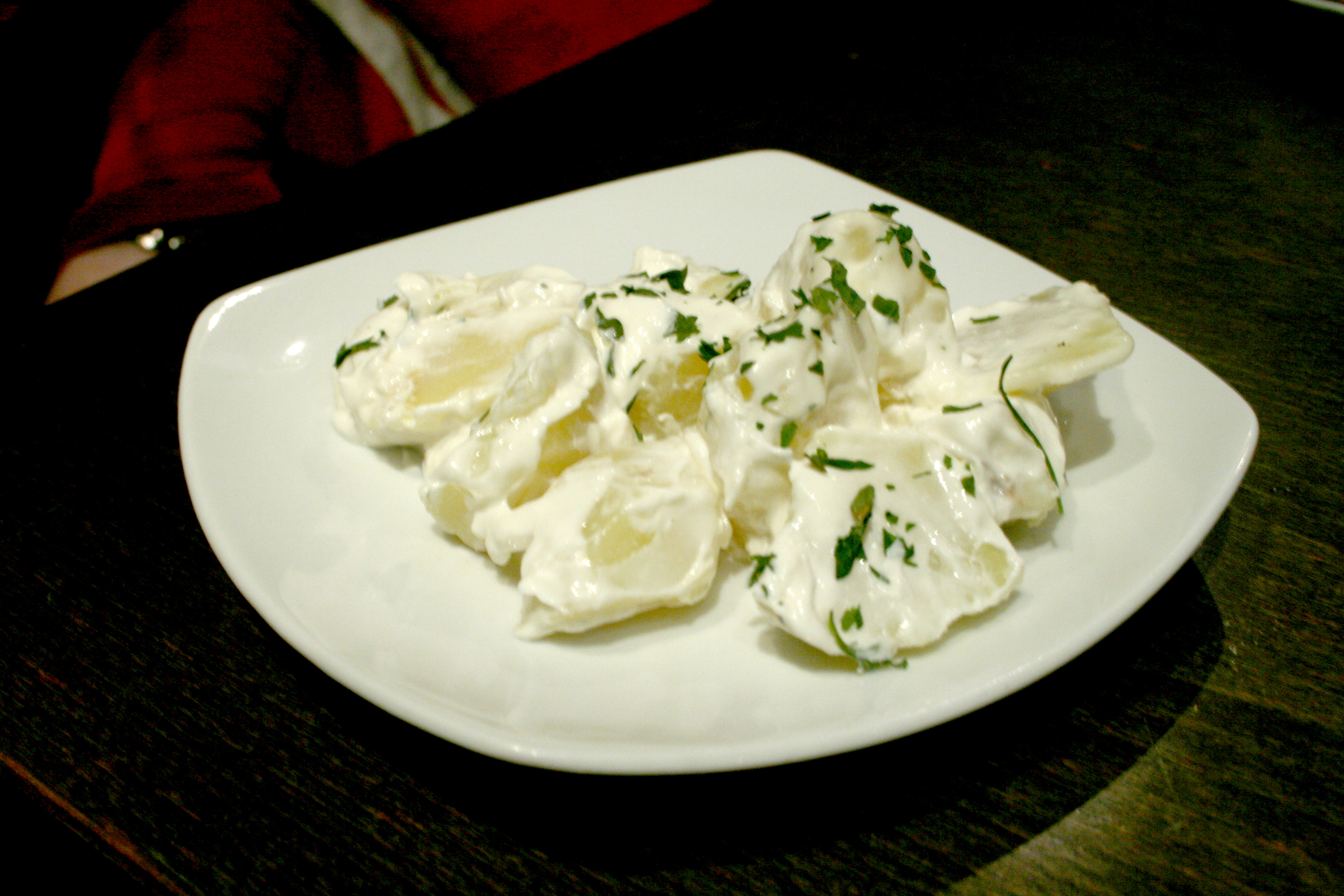 Patatas alioli